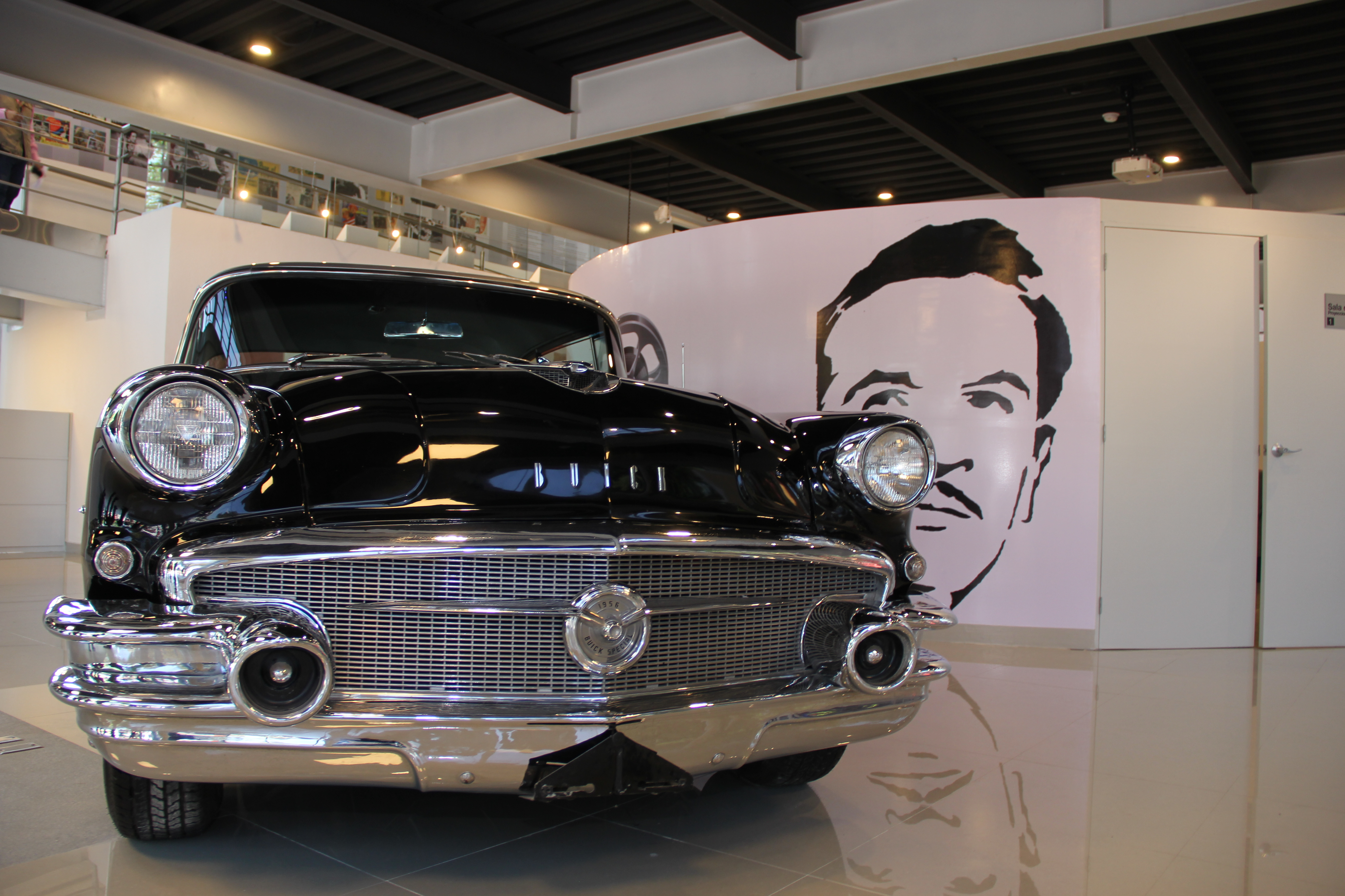 Museo Pedro Infante automóvil- Alfa proveedores y contratistas